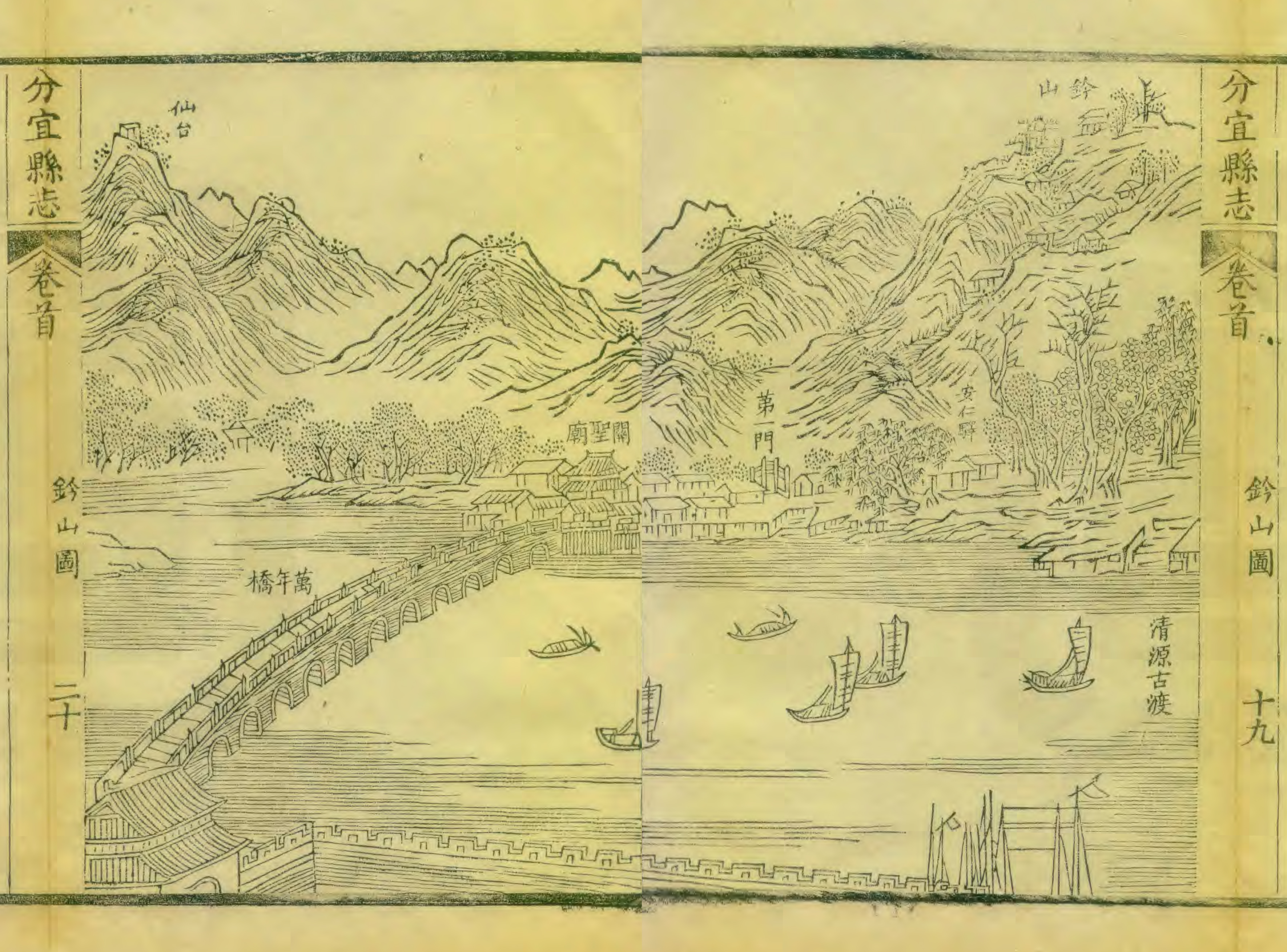 同治十年（1871）《分宜县志》钤山图（即钤冈山），左为万年桥。